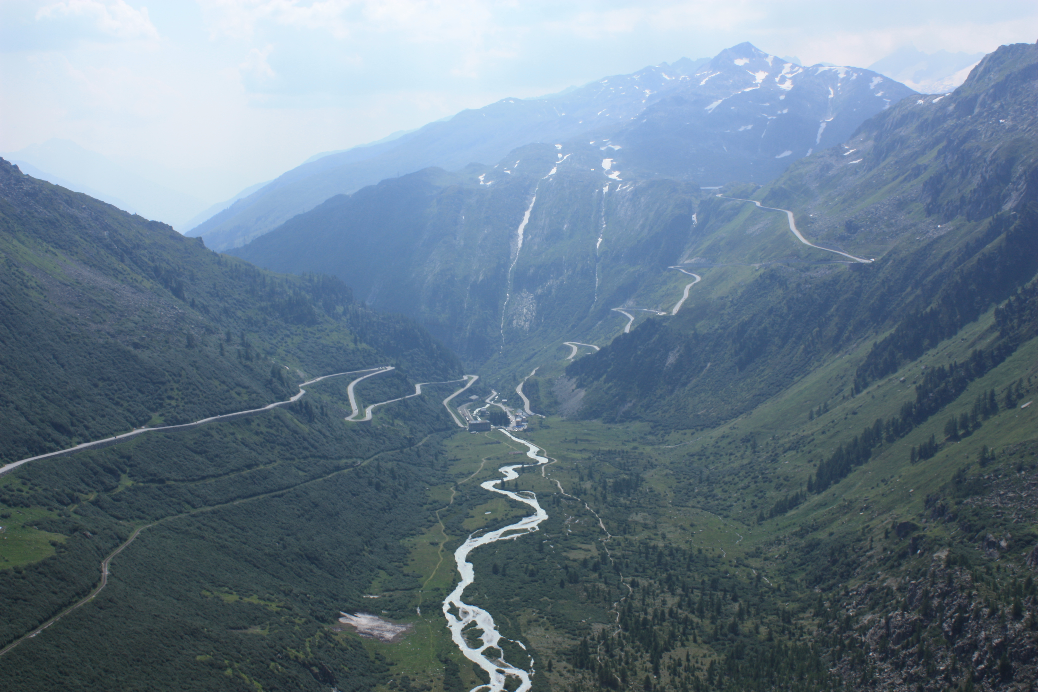 Vue sur Gletch, le Rhône (centre), la route de la Furka (gauche) et la route du Grimsel (droite) depuis l'hôtel de la Belvedere à côté du glacier du Rhône.